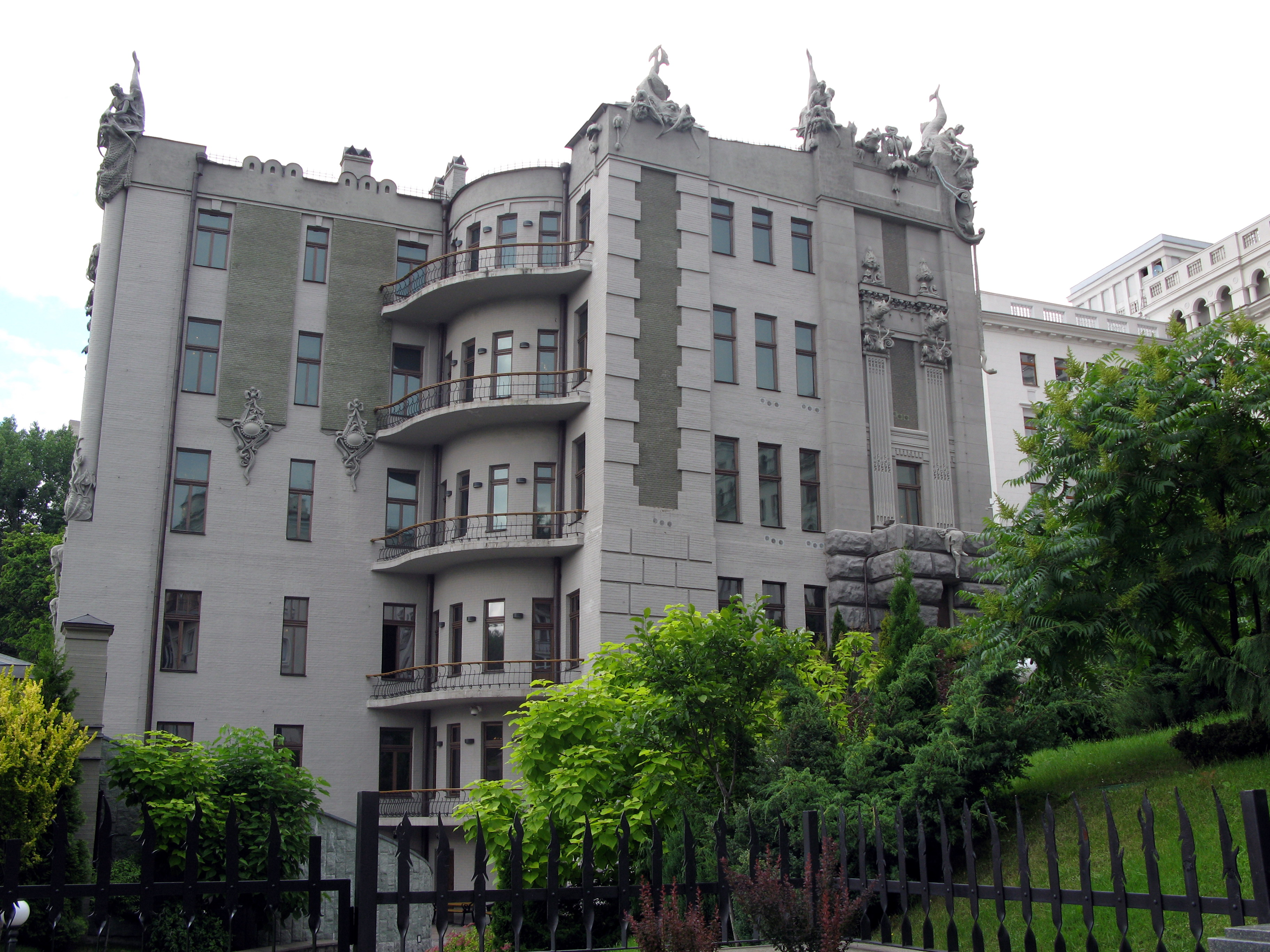 Будинок прибутковий, в якому жив В. В. Городецький, архітектор, Банкова вул., 10, Київ